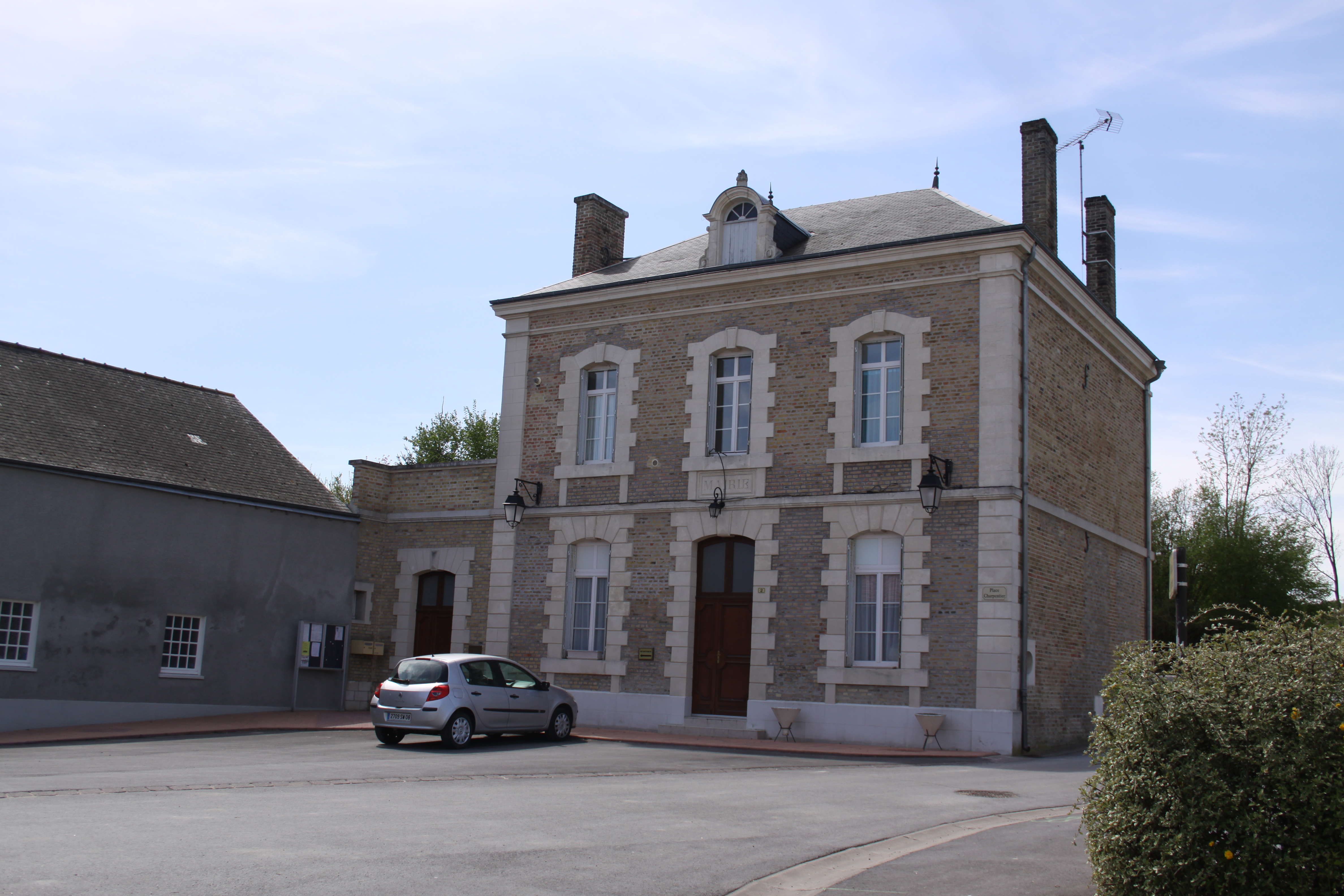 Village Ardennais